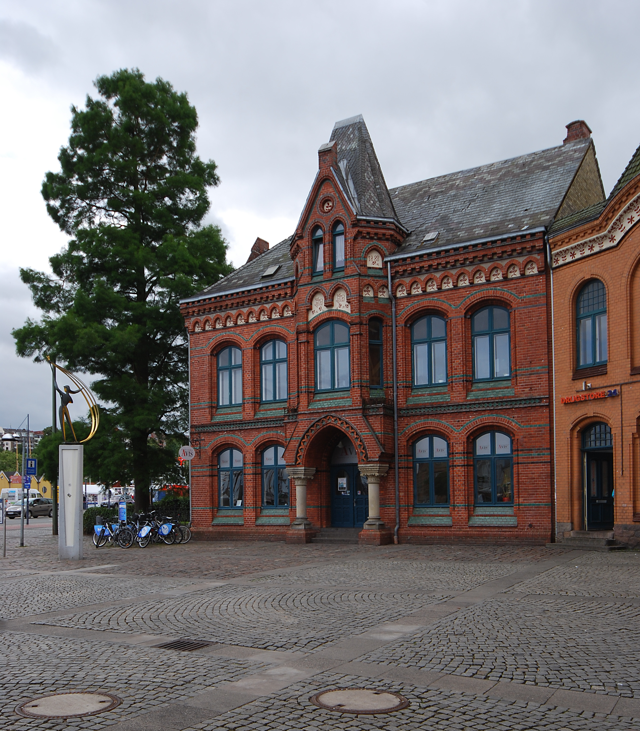 Wohn- und Geschäftshaus in der Schiffbrückstraße im Stadtteil Altstadt der kreisfreien Stadt Flensburg in Schleswig-Holstein; In dem Wohn- und Geschäftshaus von 1883 ist heute das Stadtbüro der Tageszeitung Flensborg Avis untergebracht. Von 2006-2011 diente das Gebäude in der Serie "Da kommt Kalle" als Polizeiwache. Direkt neben dem Baudenkmal stockt eine Sumpfzypresse, welche als Naturdenkmal der Stadt Flensburg ausgewiesen ist. Auf der rechten Seite wurde im Jahr 1902 ein Erweiterungsbau errichtet in dem sich heute ein Kiosk befindet und ebenfalls als Baudenkmal ausgewiesen ist. Die nach dem Entwurf des Flensburger Bildhauers und Lehrers der Werkkunstschule Hermann Menzel geschaffene Skulpture Windsbraut steht in unmittelbarer Nähe zu dem Baudenkmal (vgl. Schiffbrücke (Flensburg)).